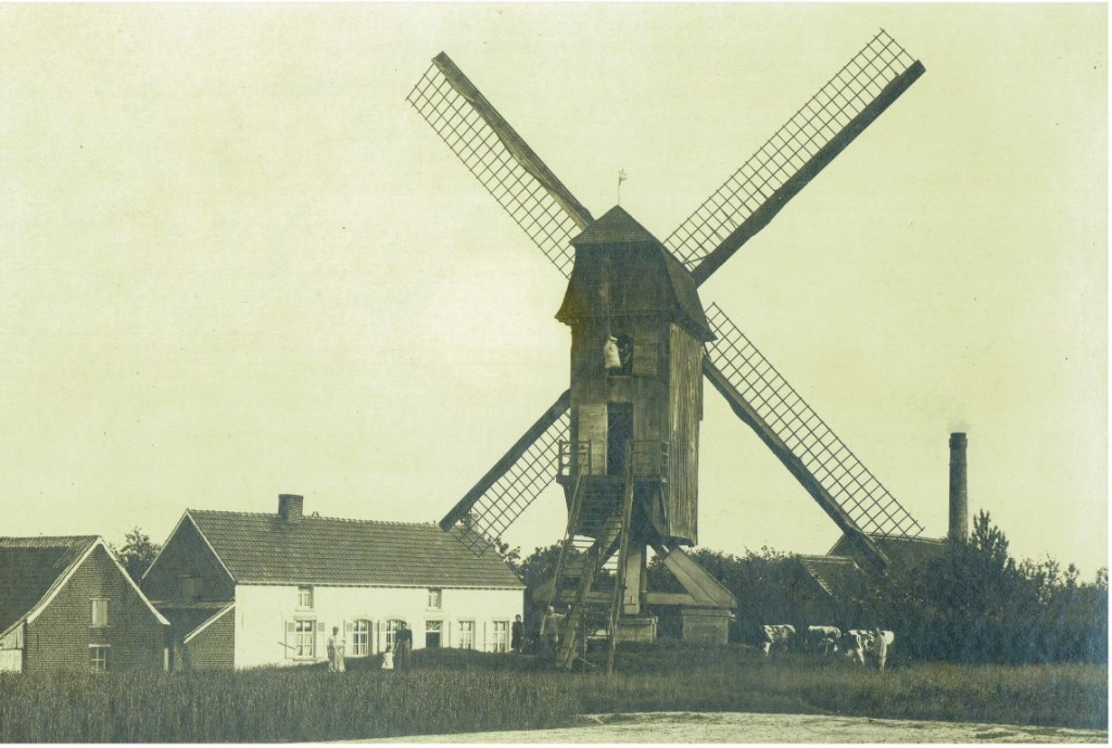 Eikoutermolen